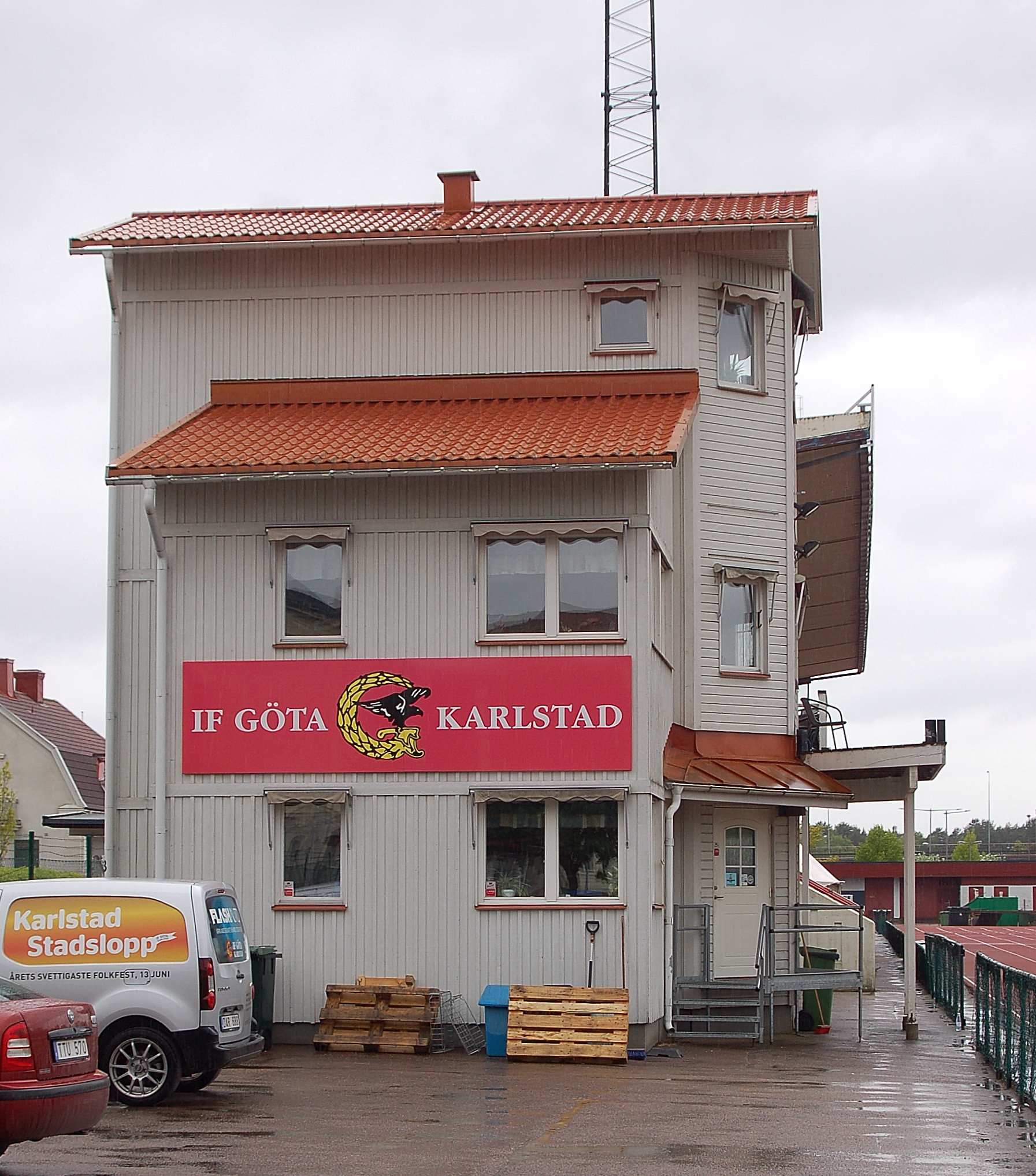 IF Göta tornet på Tingvalla Idrottsplats, Karlstad.